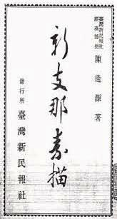 中文（台灣）: 臺灣人陳逢源著